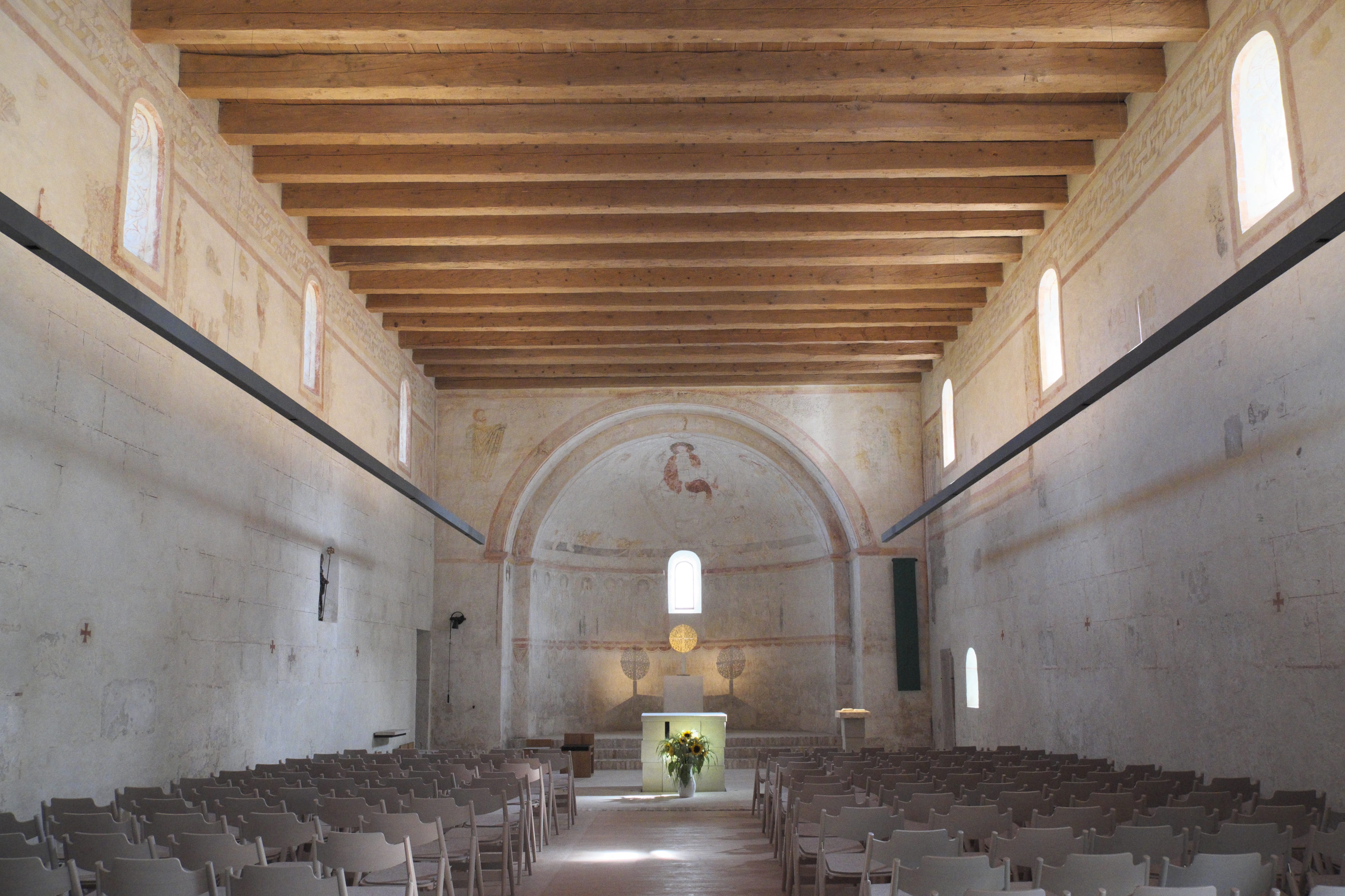 Katholische Filialkirche St. Aegidius in Keferloh (Grasbrunn) im Landkreis München (Bayern/Deutschland), Innenraum This is a photograph of an architectural monument.